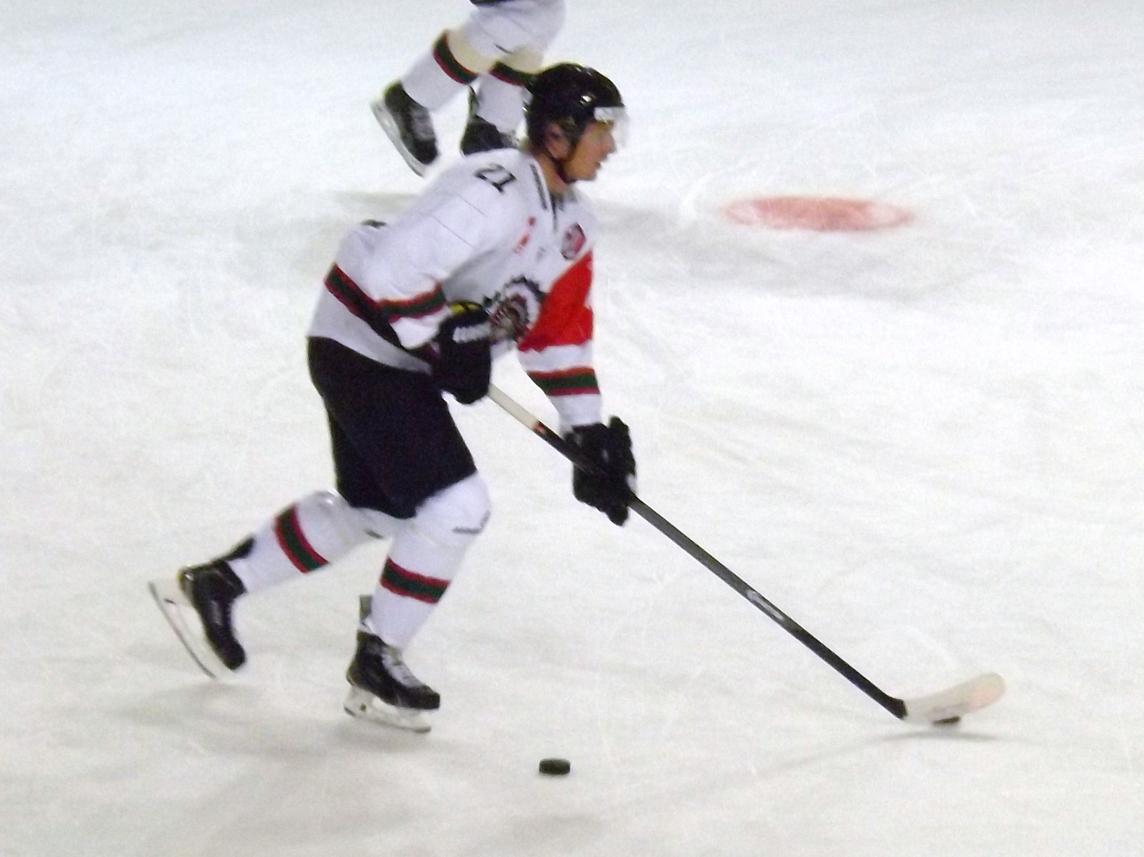 Joueur de hockey sur glace Frölunda Indians, CHL 2014